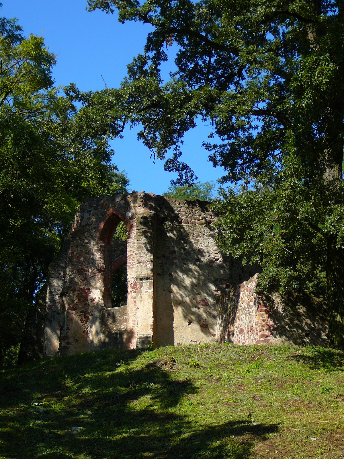 kolostorrom (Salföld, ) This is a photo of a monument in Hungary, Identifier: 12654